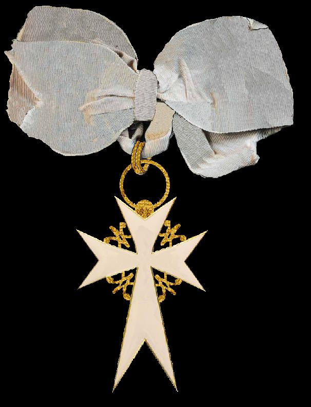 Orde van het Vertrouwen, DOOR MIJ GETEKEND NAAR AANLEIDING VAN DE IN HET ARTIKEL GENOEMDE SCHILDERIJEN.